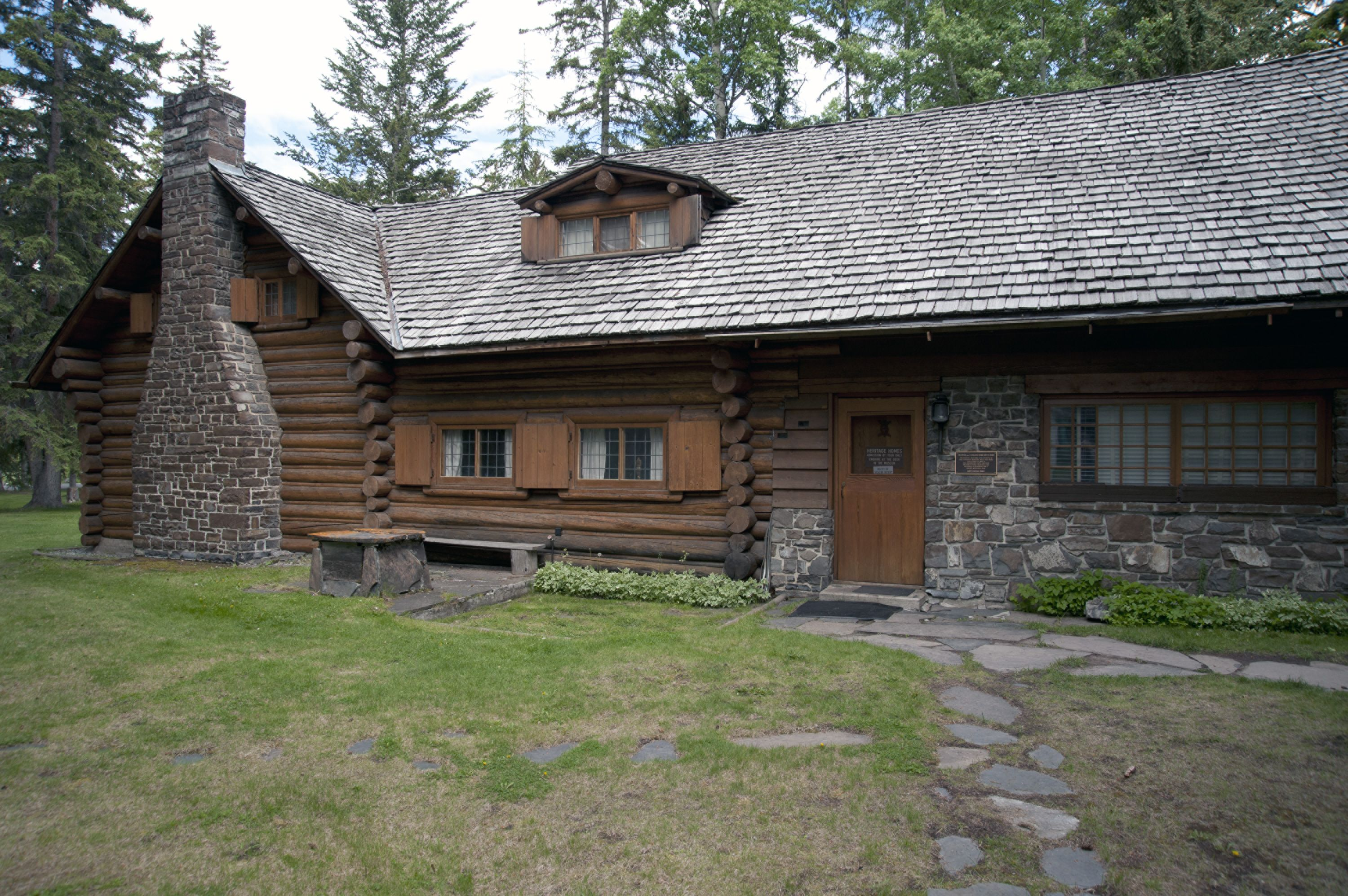 La maison historique des Whyte vu de l'extérieur